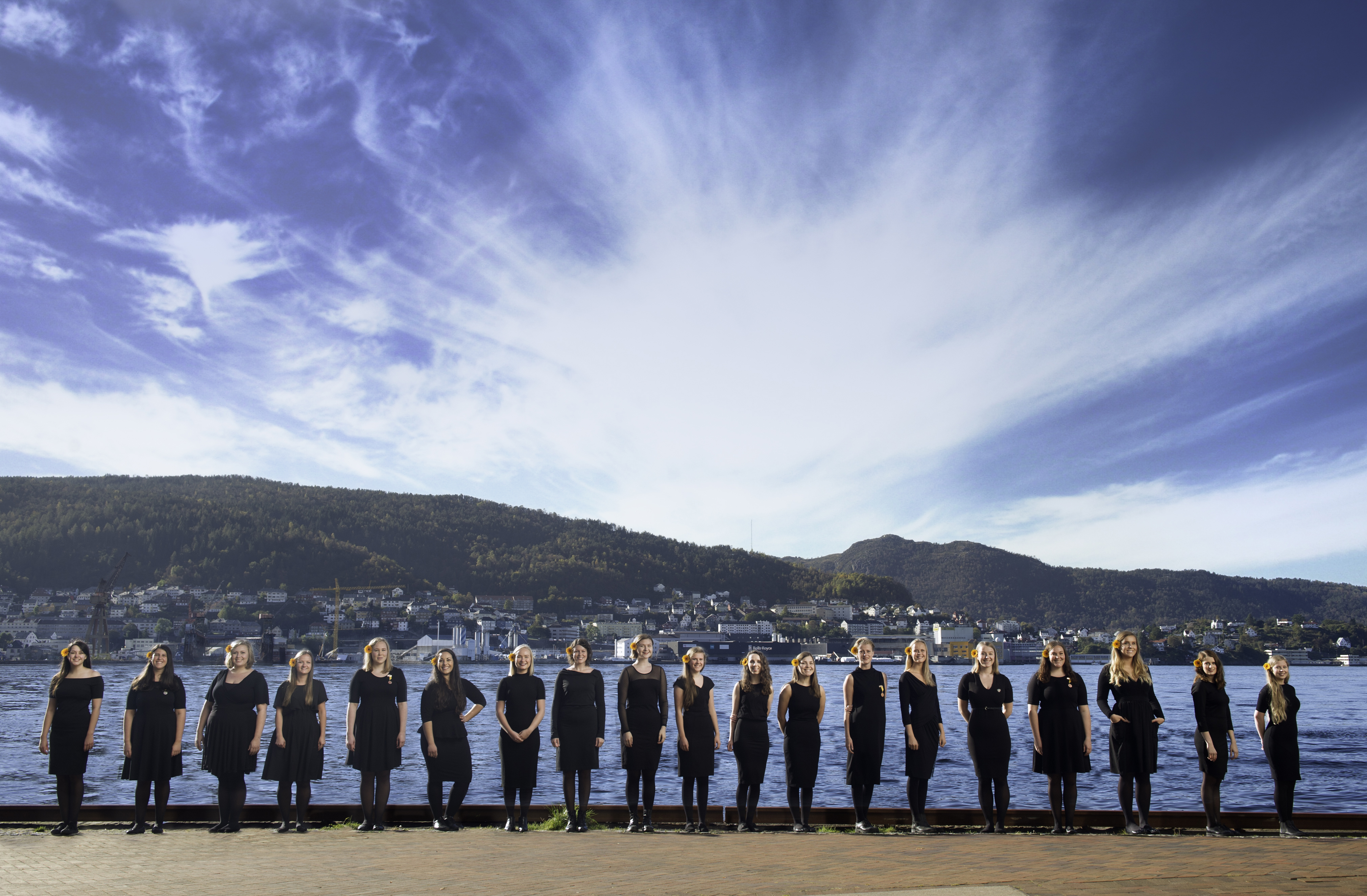 Studinekoret Sirenene på Verftet, Oktober 2016. Fotograf: Jon Danielsen